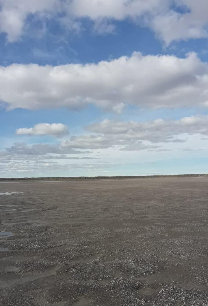 Laguna Carri Lauquen chica, Ingeniero Jacobacci, Rio Negro, Argentina.